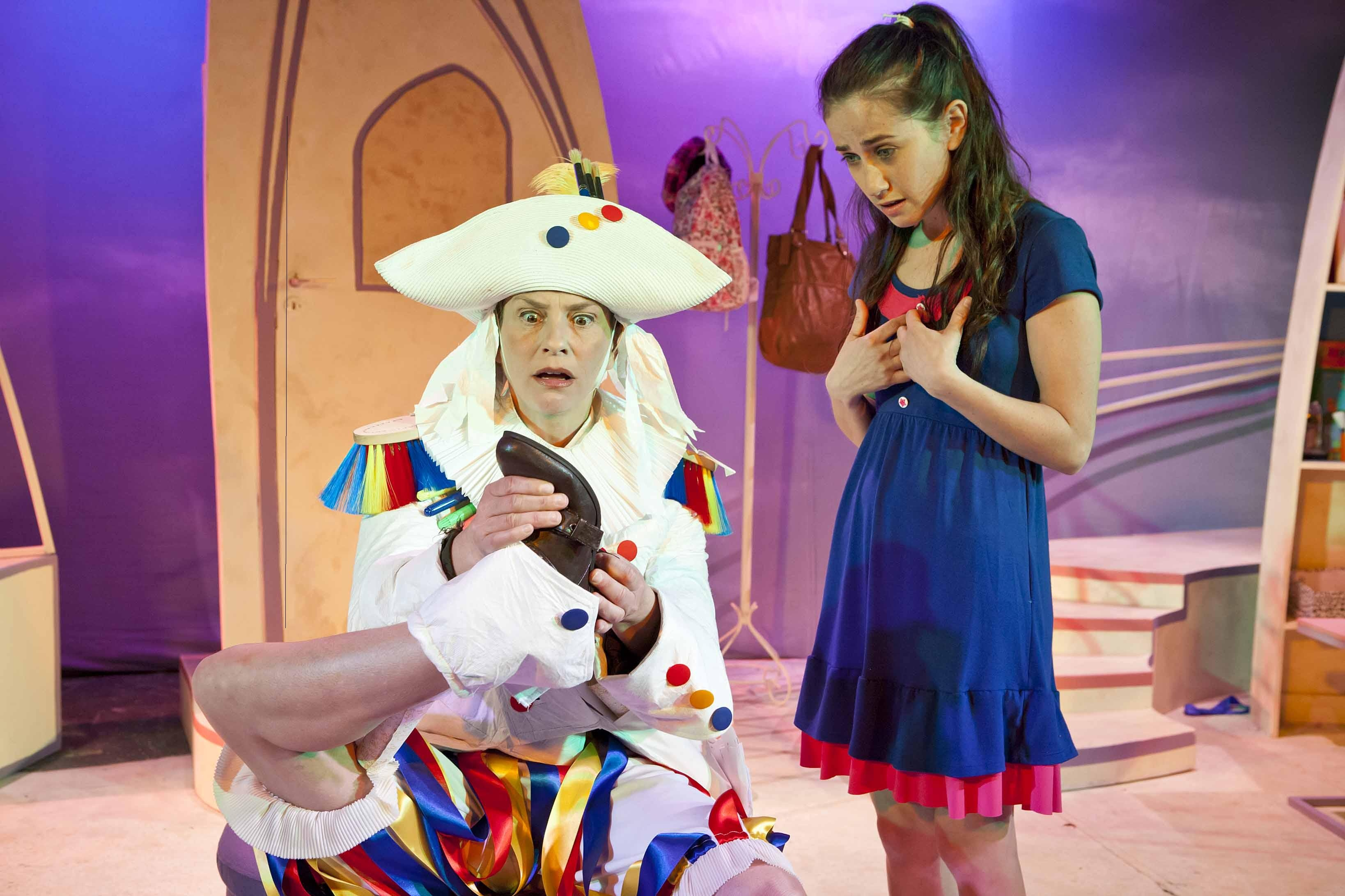 נעמה שטרית ואביגיל אריאלי בהצגה "אבא של עמליה נוסע לאוסטרליה", בבימויו של אורי אומנותי, תיאטרון חיפה